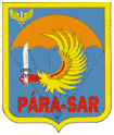 Brasão do Para-sar